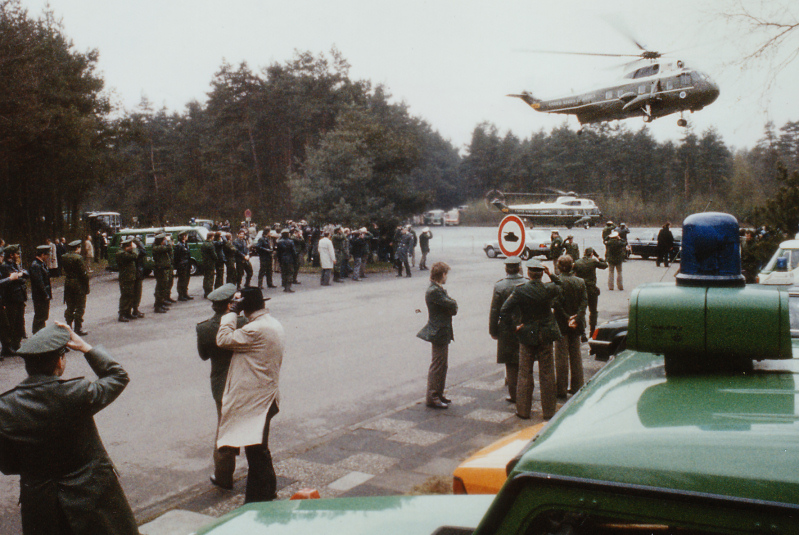 Bergen Belsen Besuch von Reagan